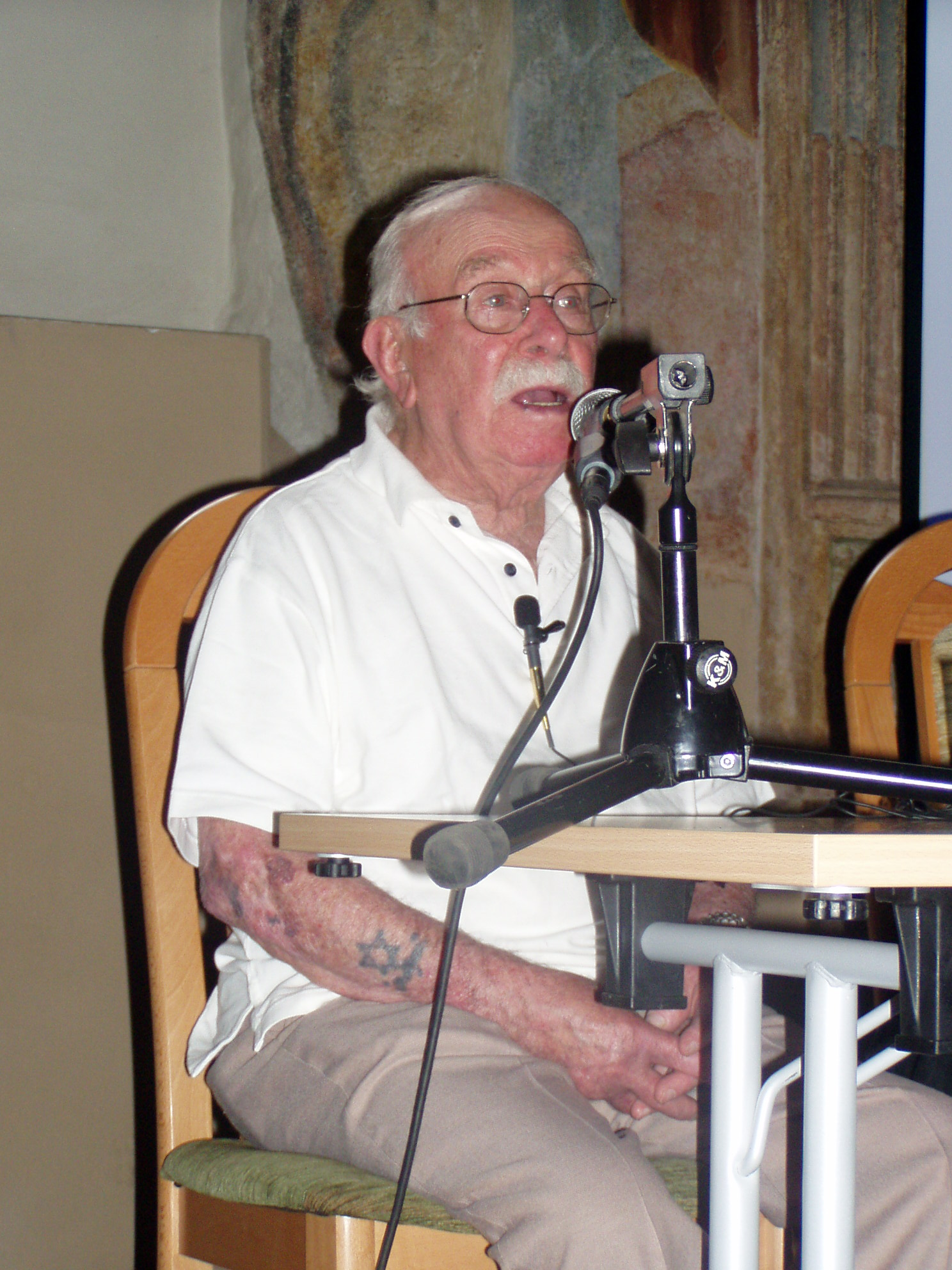 Mayer Kirshenblatt na wykładzie w synagodze Kupa podczas Festiwalu Kultury Żydowskiej w Krakowie